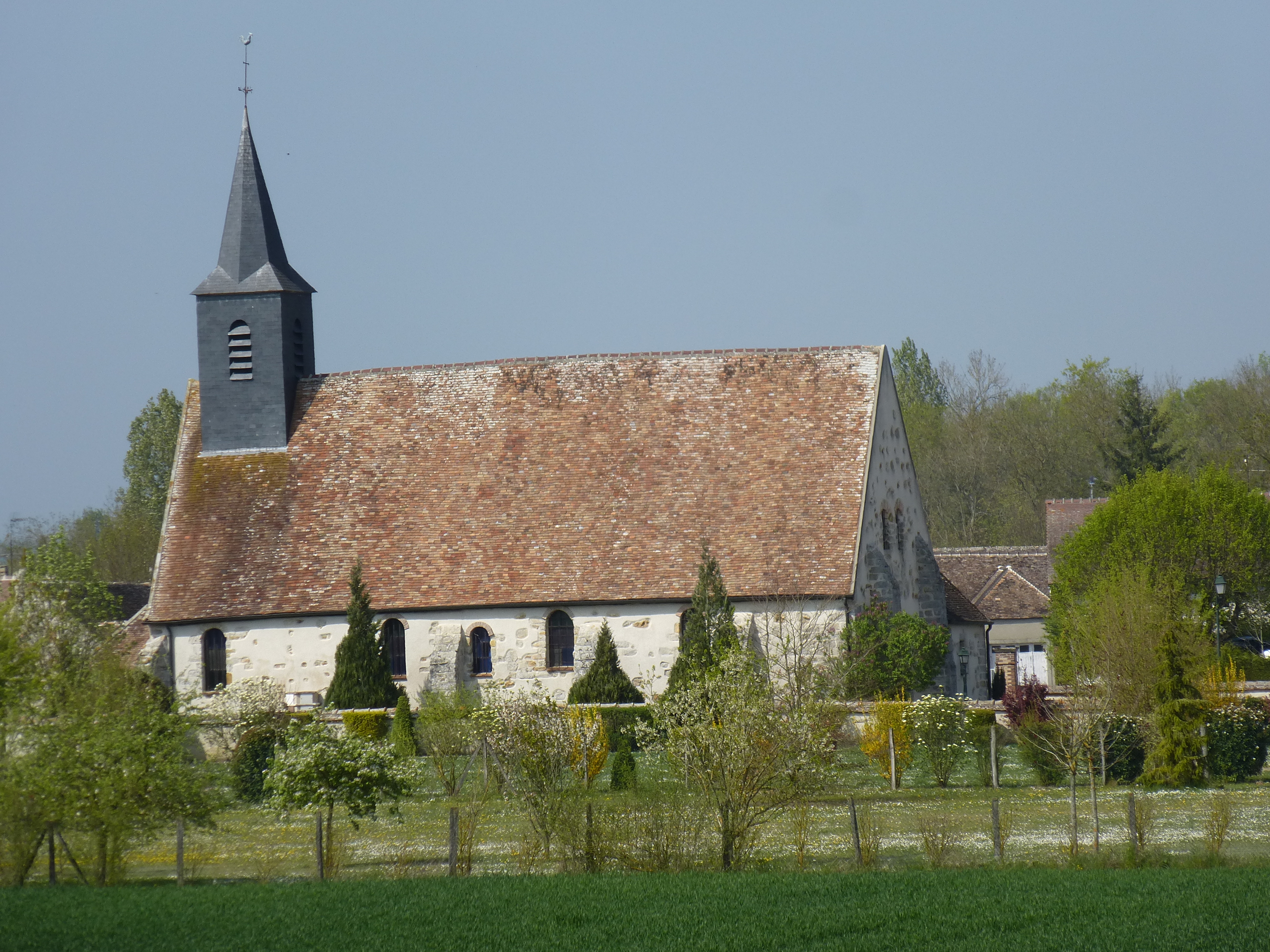 Église Saint-Maurice de Gravon. (Seine-et-Marne, région Île-de-France).